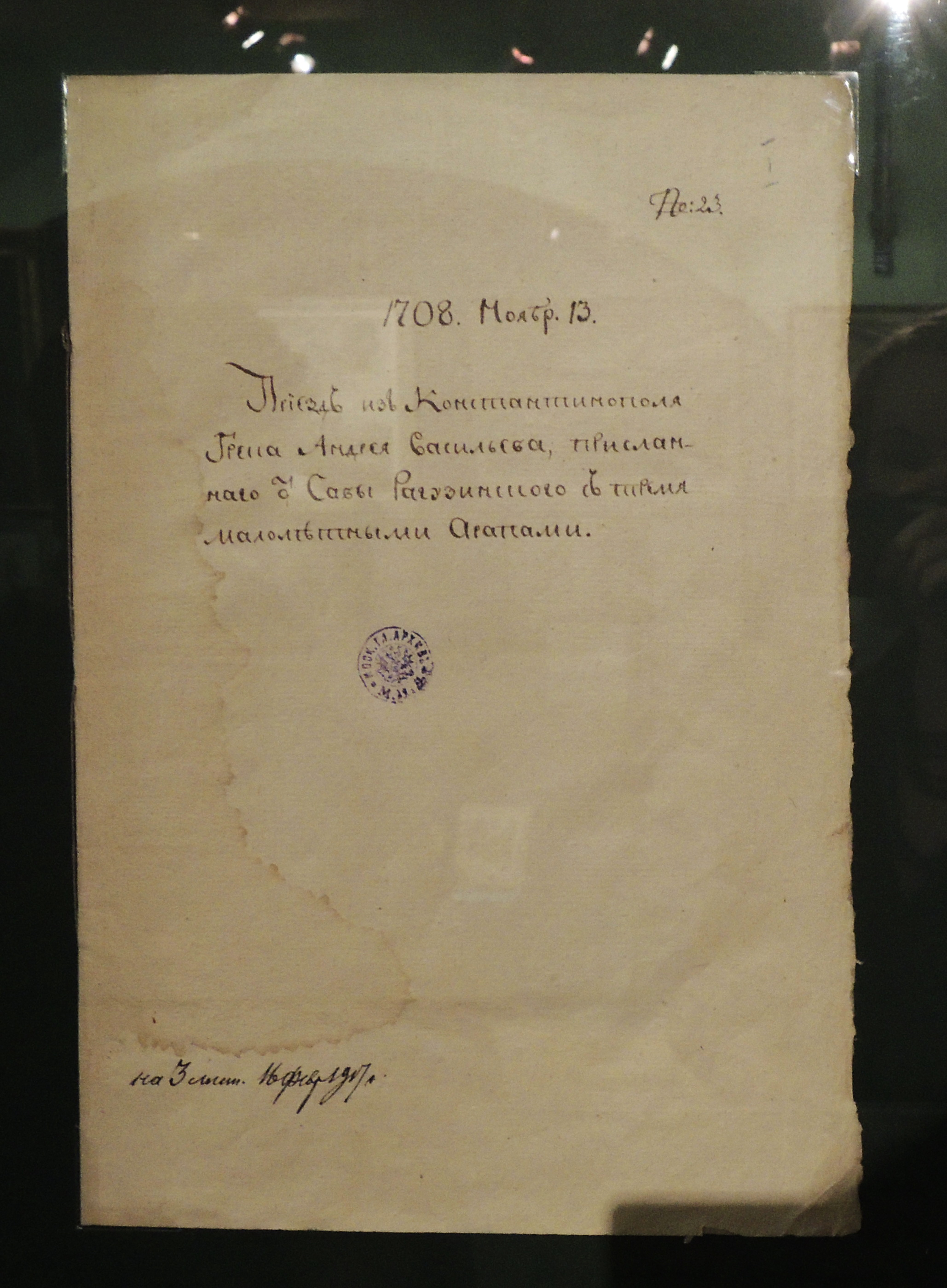 Запись в Посольском приказе о приезде из Константинополя грека Андрея Васильева, посланного от Савы Рагузинского с тремя малолетними арапами. 13 ноября 1708 г. Один из них - Абрам Ганнибал. РГАДА